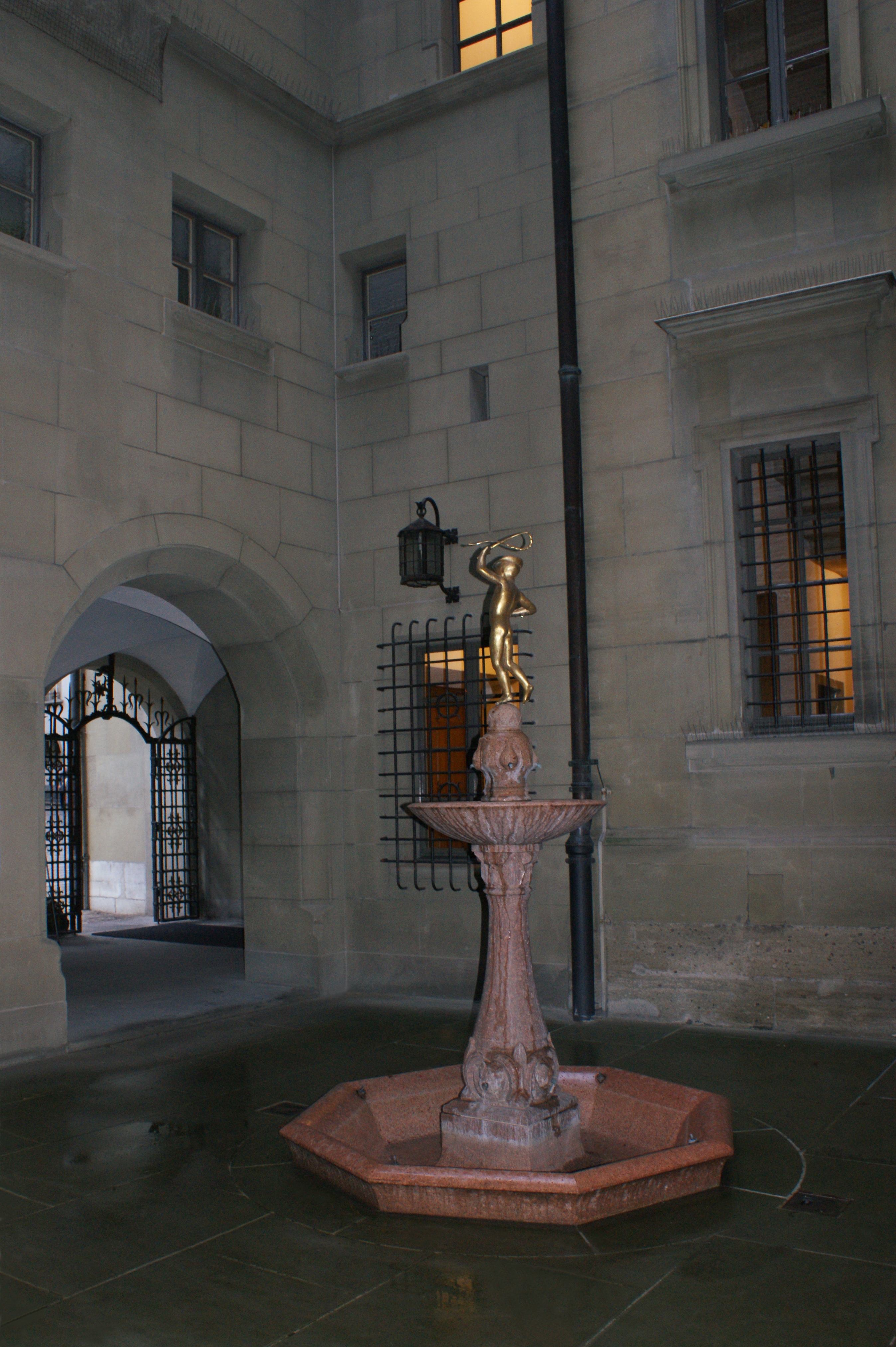 Rathaushofbrunnen mit Eingang zum Rathaushof im Hintergrund